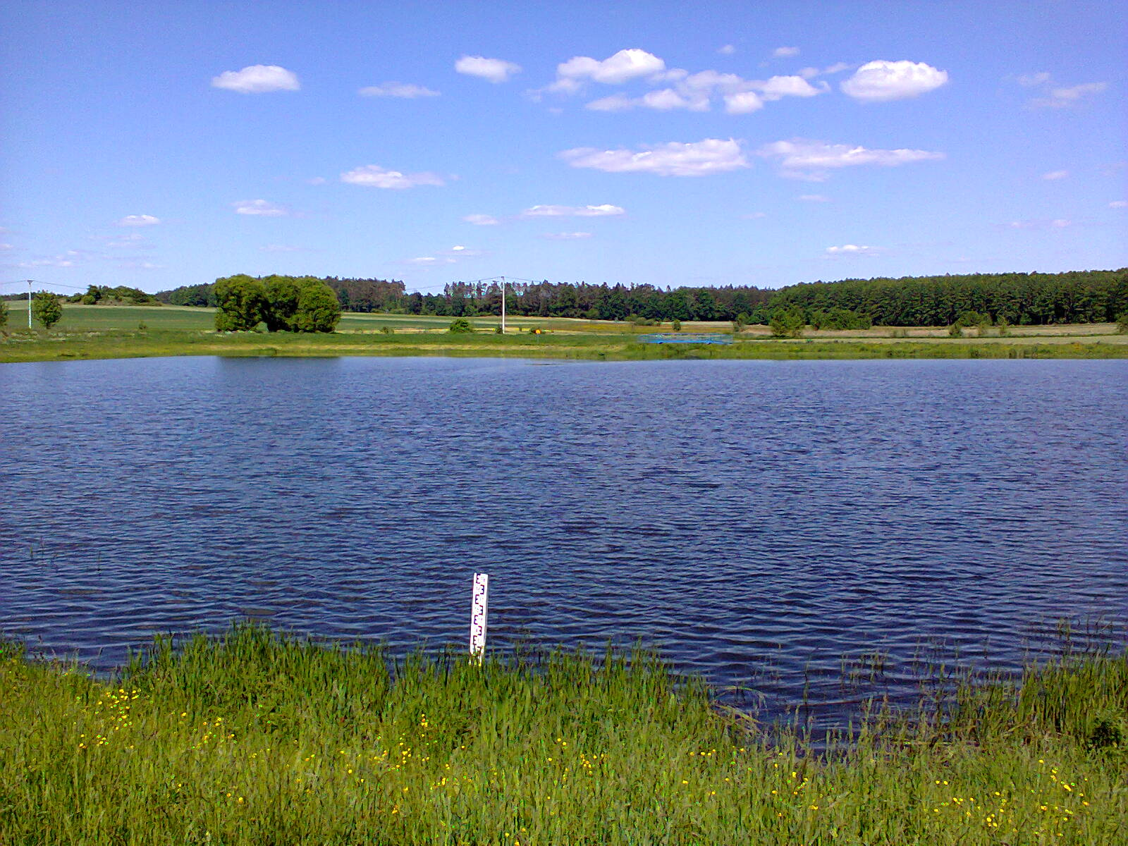 Zalew w Dzierzbi (powiat kolneński)